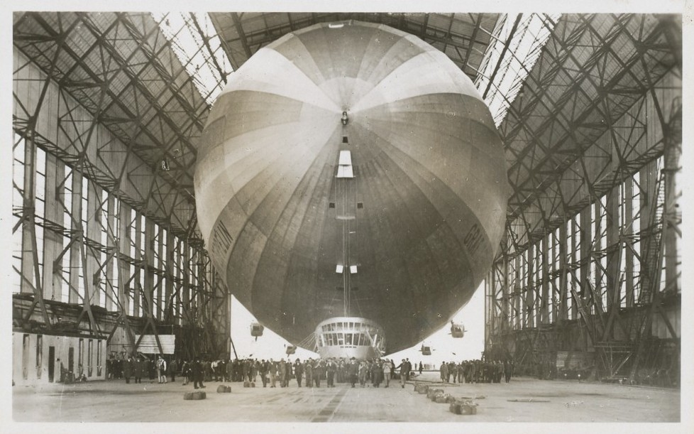 Das Luftschiff Graf Zeppelin